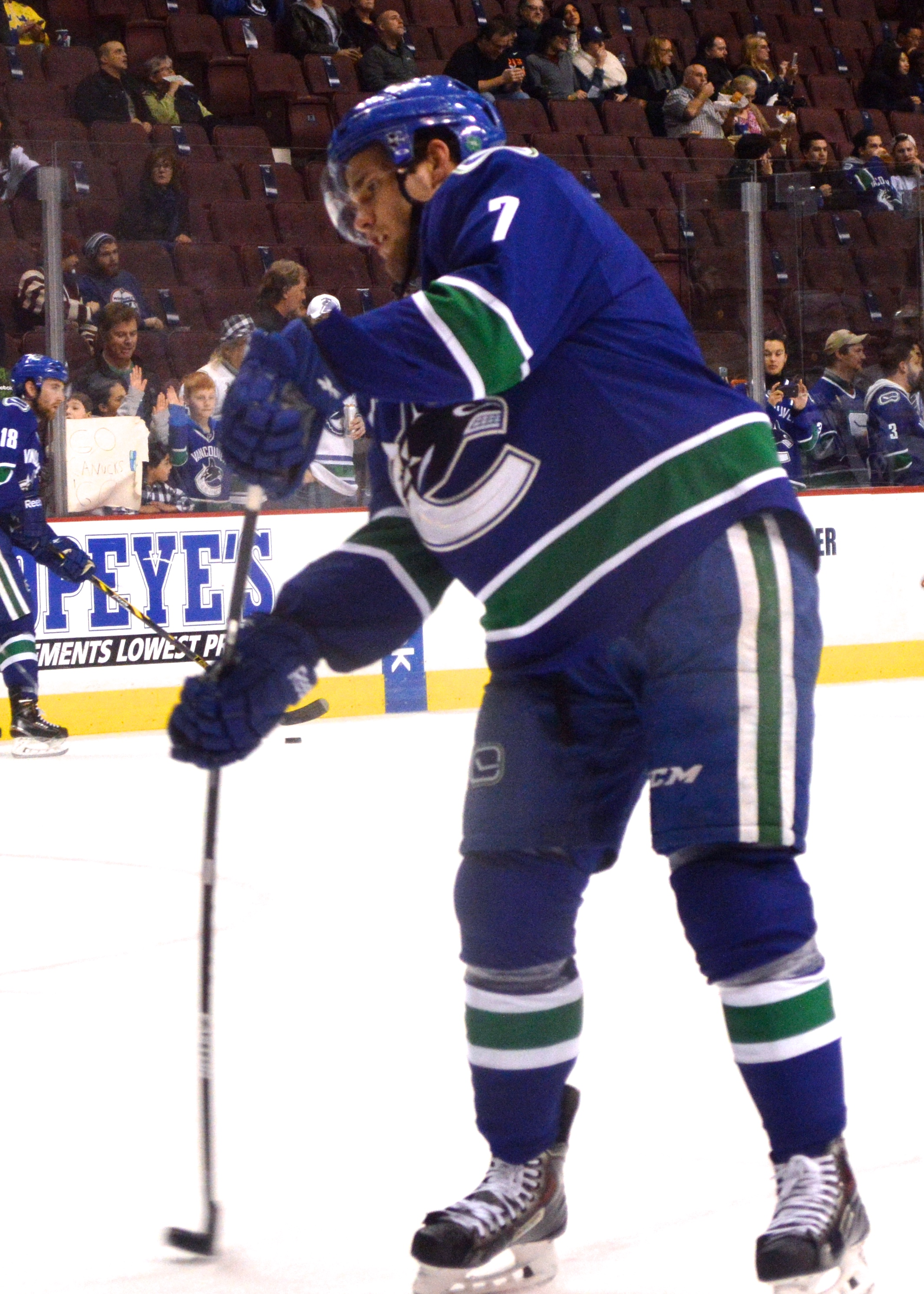 Linden Vey